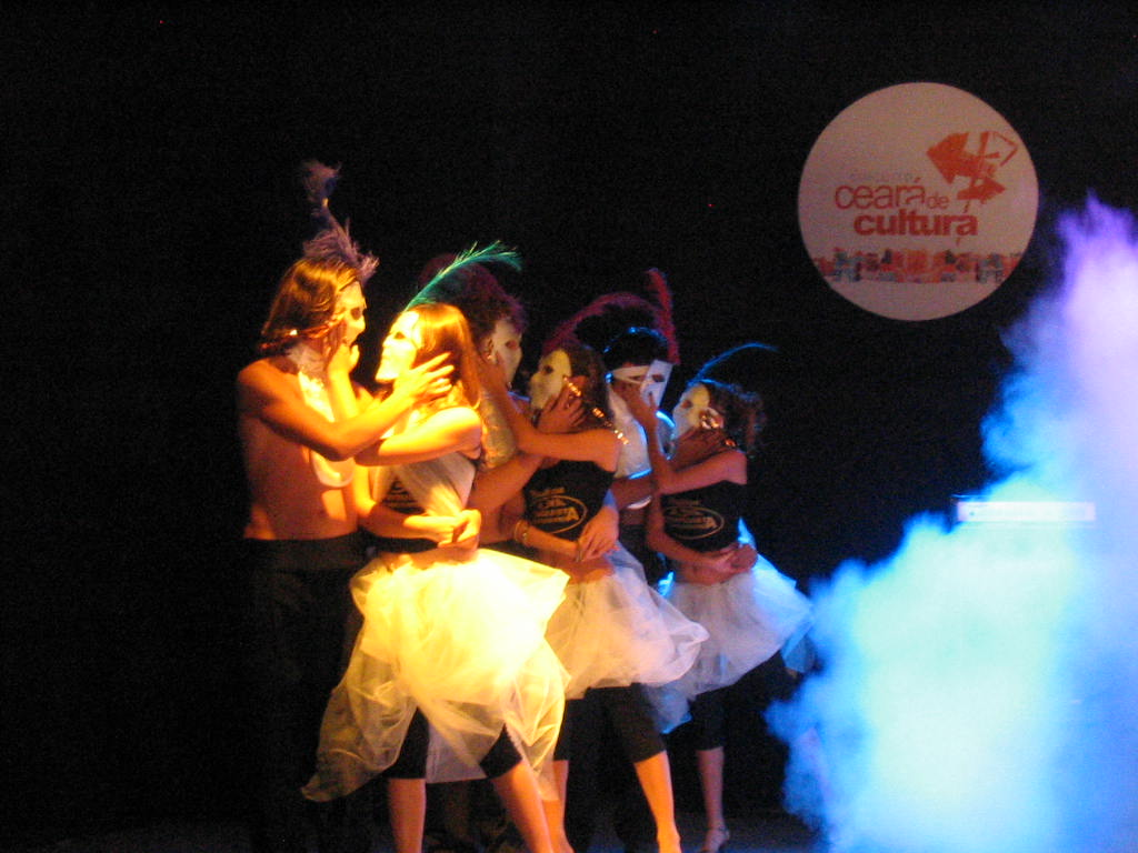 Circuito Ceará de Cultura sendo apresentado numa edição da FENEBE